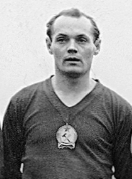 Buzánszky Jenő 49-szeres magyar válogatott labdarúgó, az Aranycsapat hátvédje, edző, sportvezető.